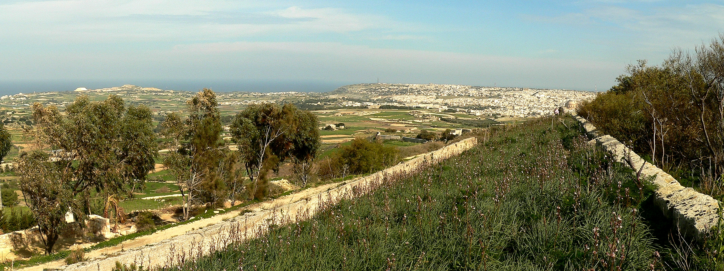 Blick von der Dwejra Lines in Richtung Mosta. Im Hintergrund erkennt man die Kuppel des Doms von Mosta.